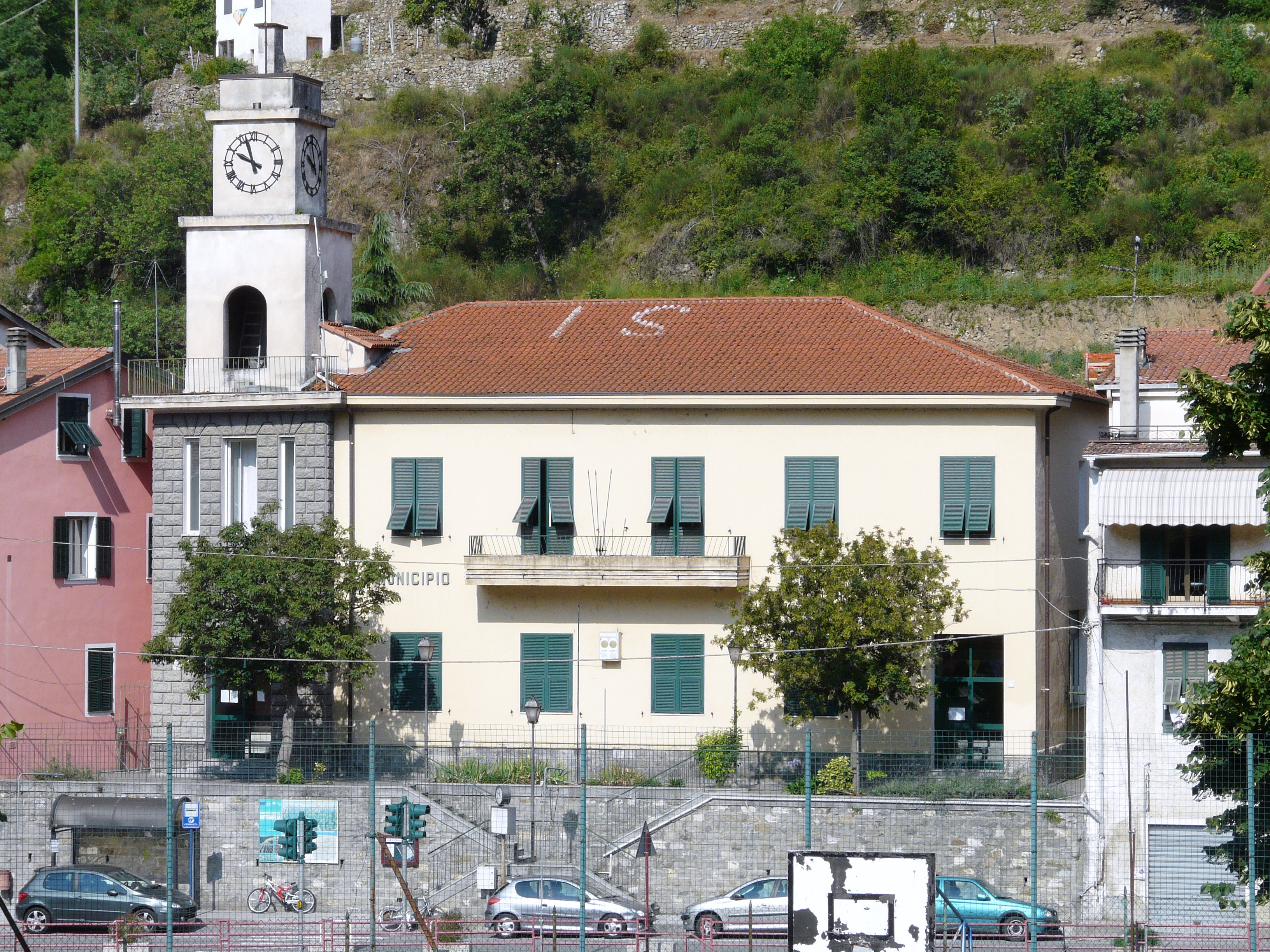 Municipio di Isolabona, Liguria, Italia